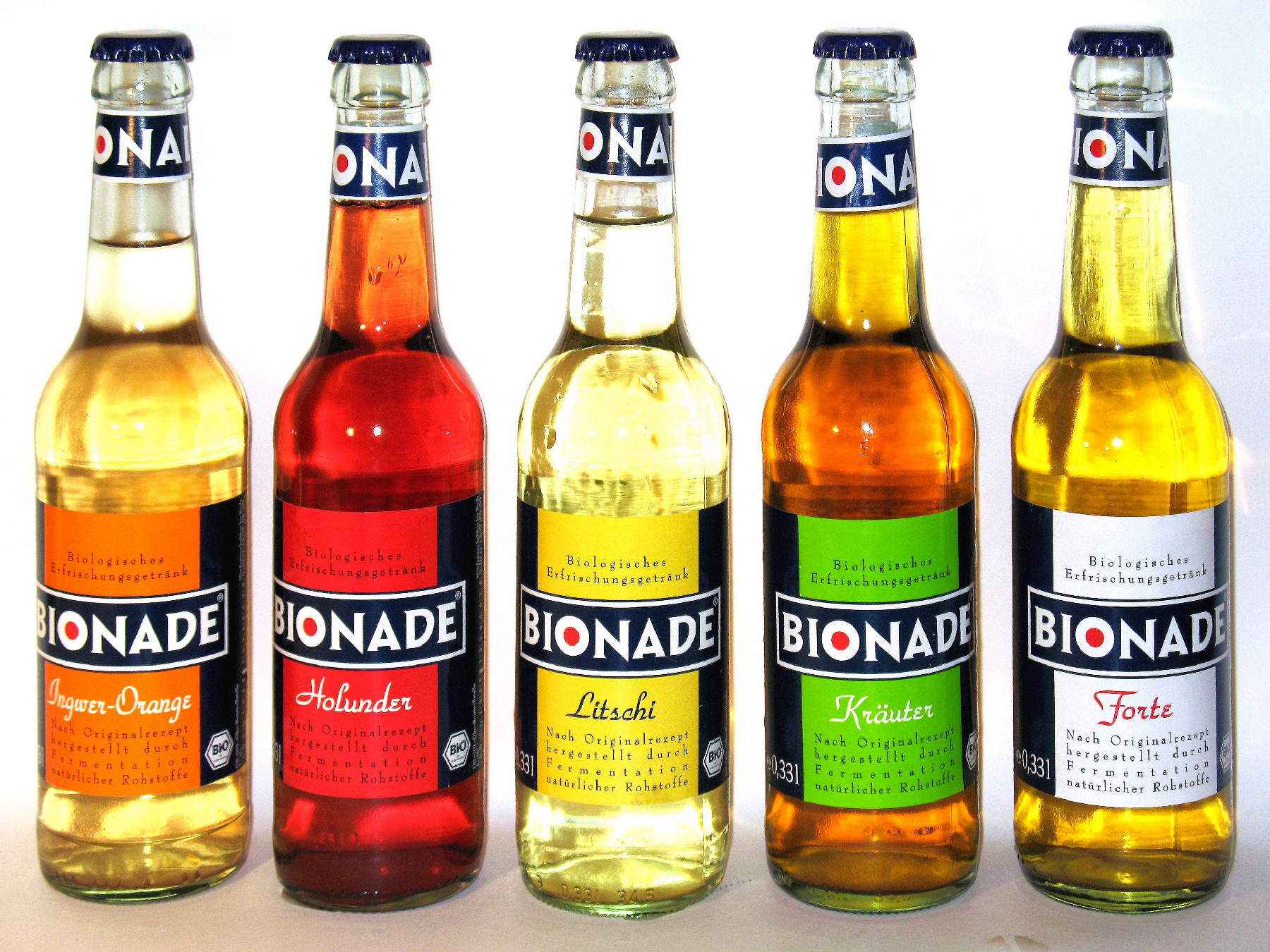 Bionade - fünf Sorten